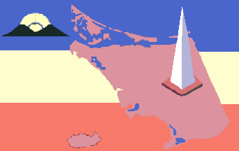 Bandera del municipio Tubores, isla de Margarita e isla de Cubagua, Estado Nueva Esparta, Venezuela